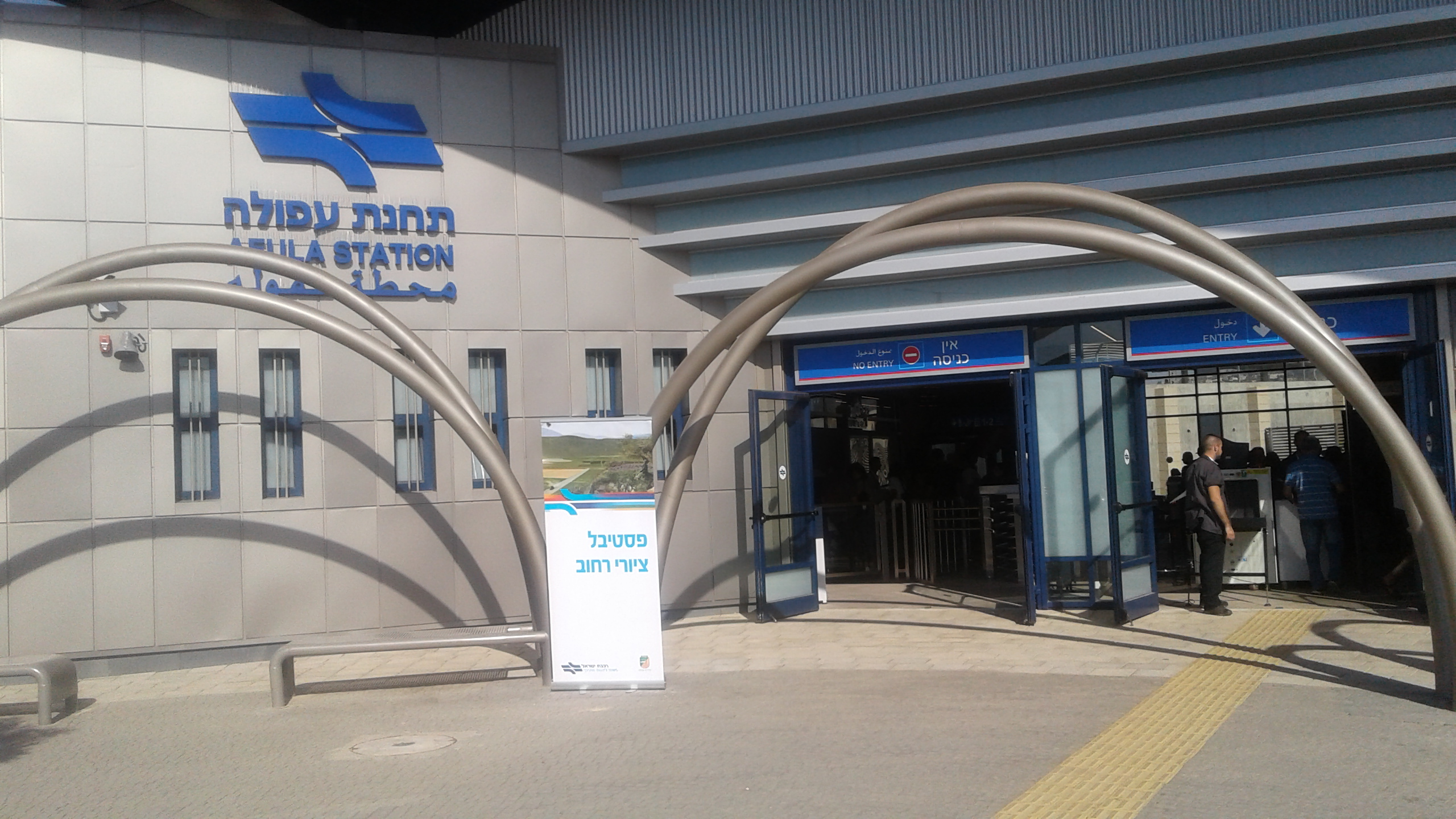 אוקטובר 2016